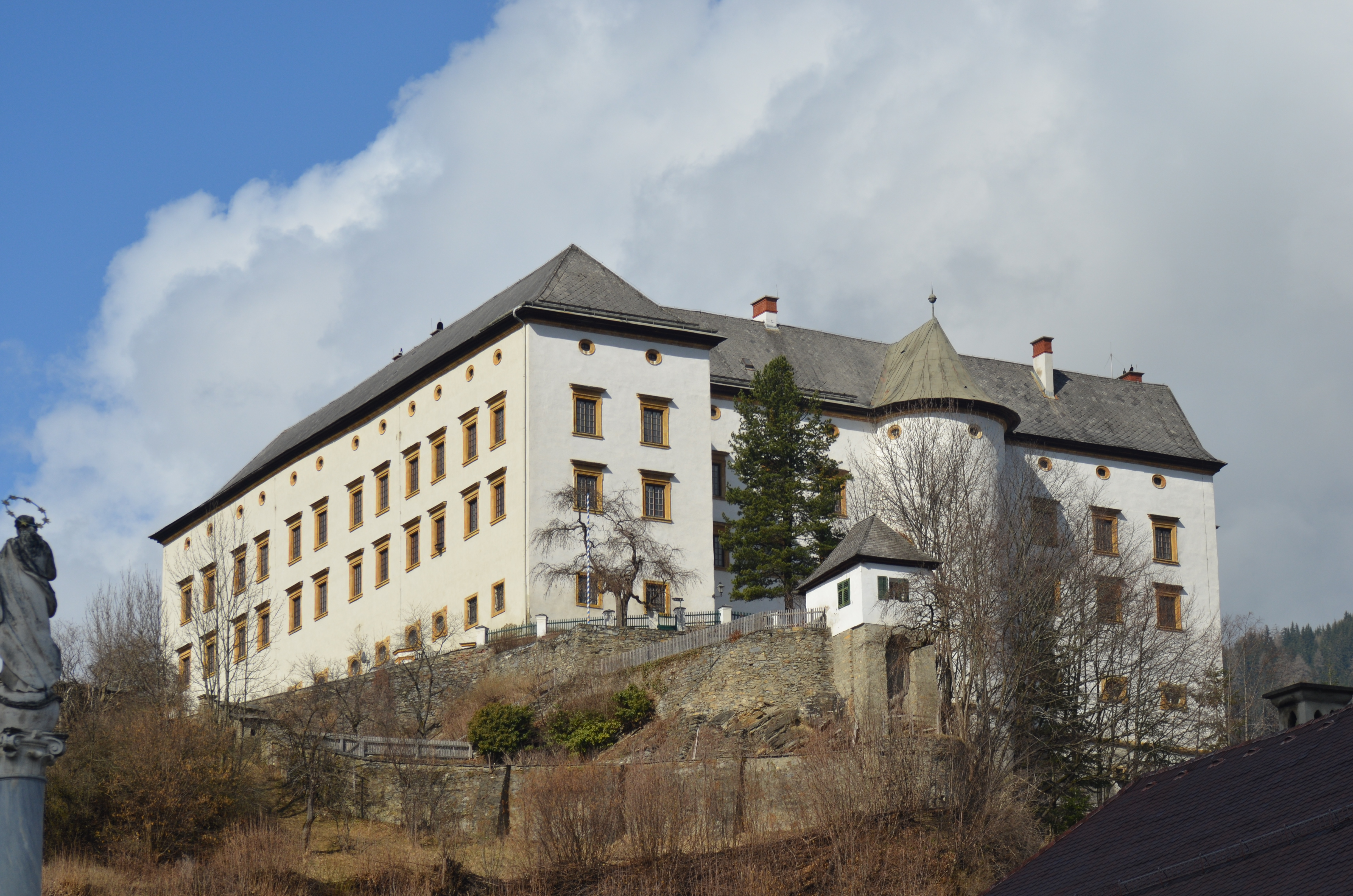 Schloss Obermurau